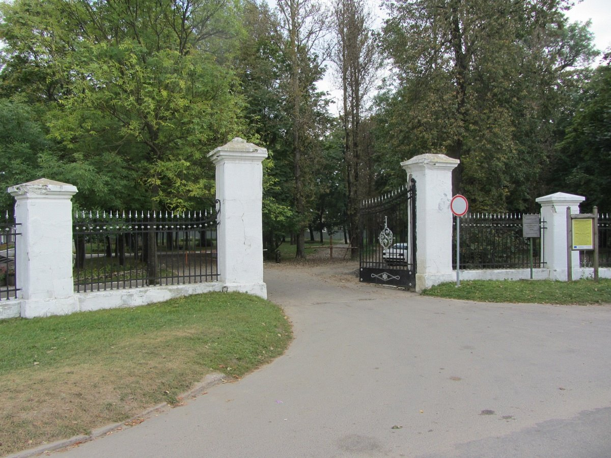 Высокае. Агароджа сядзібы